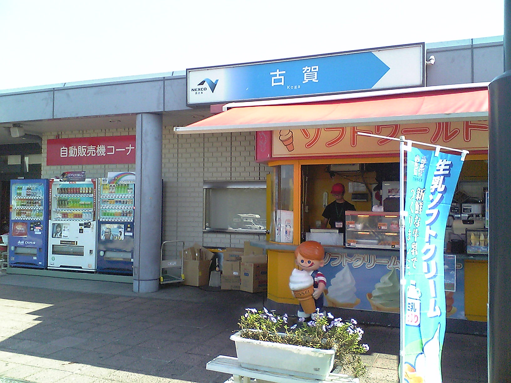 福岡県古賀市の古賀サービスエリア（下り線）